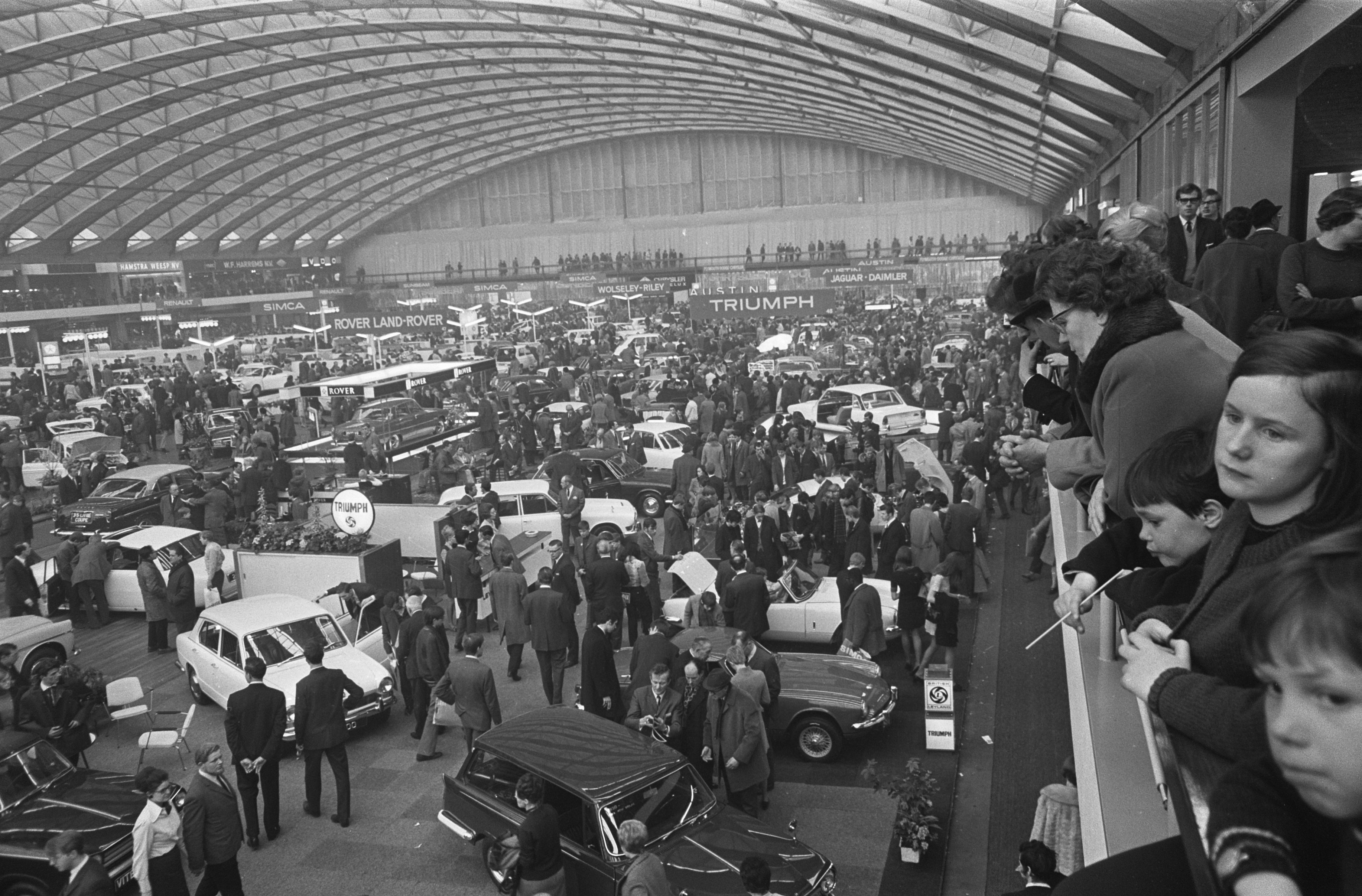 Collectie / Archief : Fotocollectie Anefo Reportage / Serie : [ onbekend ] Beschrijving : Drukte op de auto-tentoonstelling in de RAI drukte in de RAI Datum : 16 februari 1969 Locatie : Amsterdam, Noord-Holland Trefwoorden : auto's Instellingsnaam : RAI Fotograaf : Nijs, Jac. de / Anefo Auteursrechthebbende : Nationaal Archief Materiaalsoort : Negatief (zwart/wit) Nummer archiefinventaris : bekijk toegang 2.24.01.05 Bestanddeelnummer : 922-1073